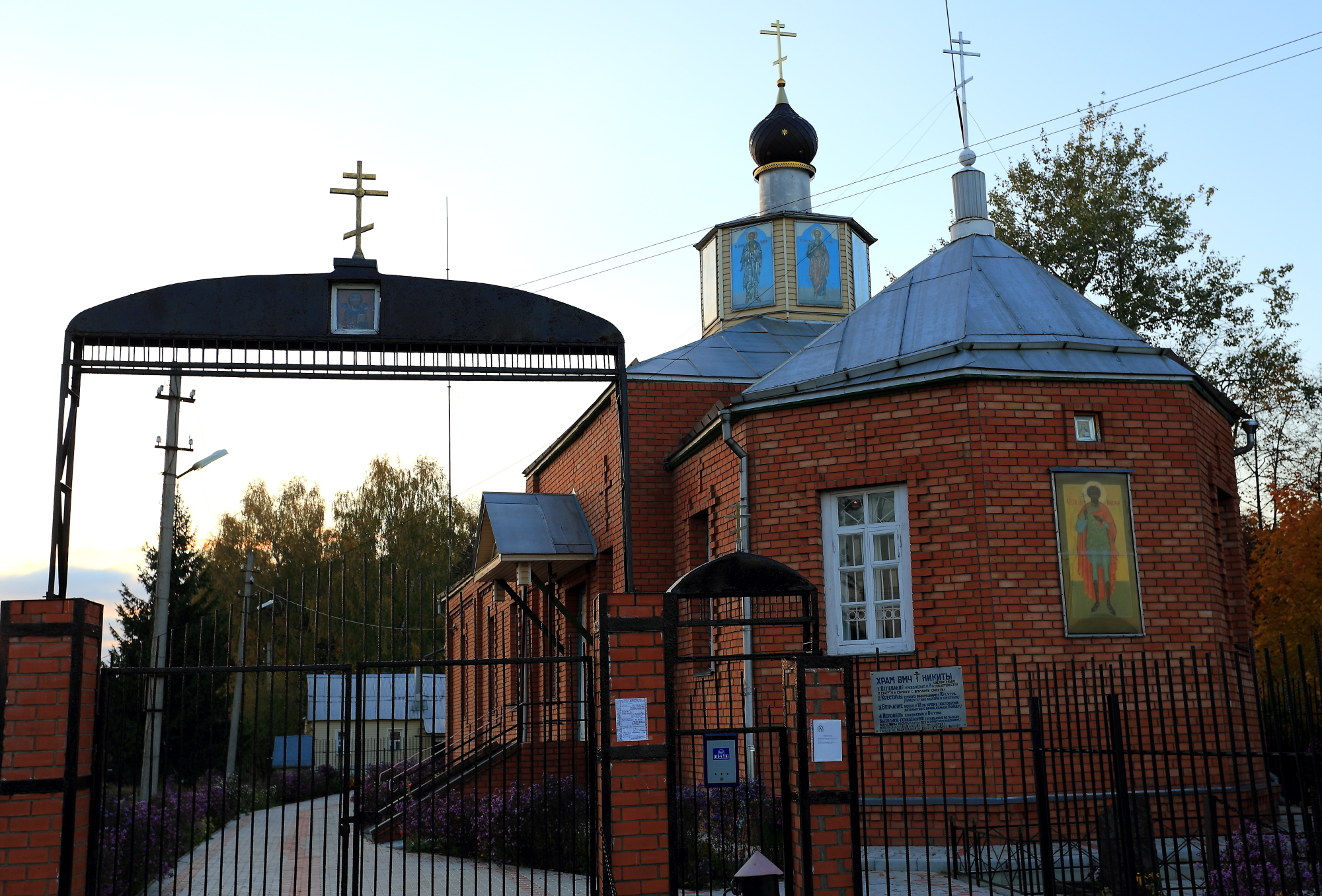 Церковь Никиты Мученика (Москва и Московская область, Ликино-Дулёво, деревня Кабаново)